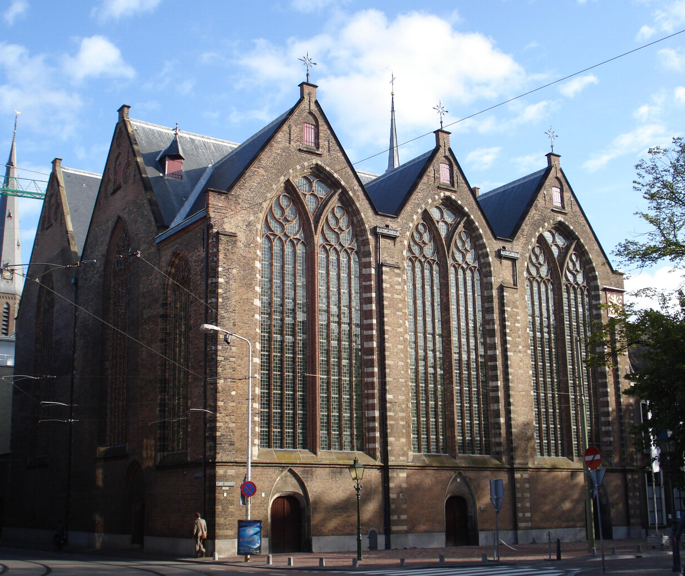 Kloosterkerk, Den Haag, Langevoorhout.